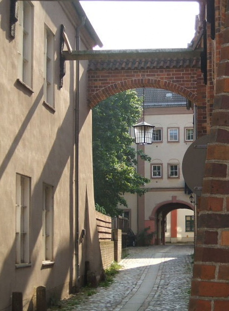 Stralsund,_Germany,_Bechermacherstraße_(2006-09-29)